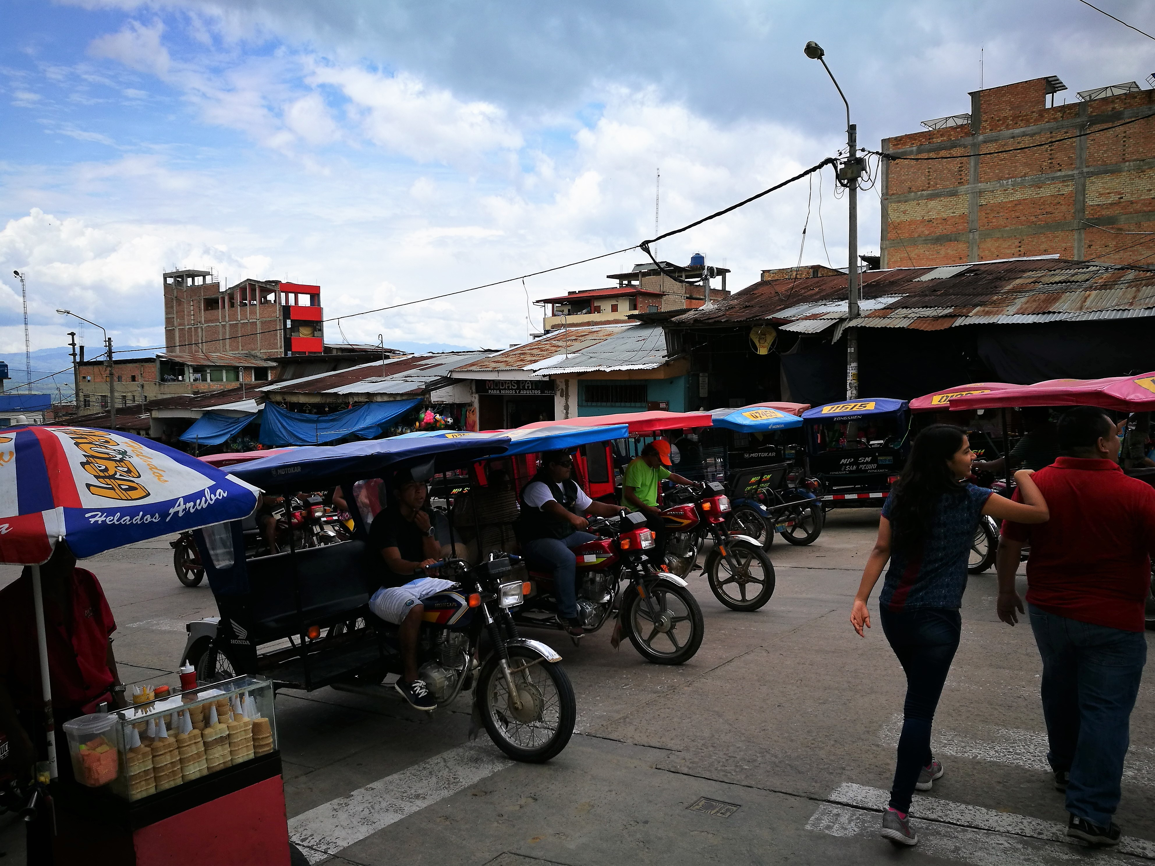 Trànsit davant del Mercado Número 2, Tarapoto